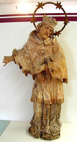 St. Nepomuk. Holzfigur aus dem 18. Jahrhundert. Stadtmuseum Bruchsal